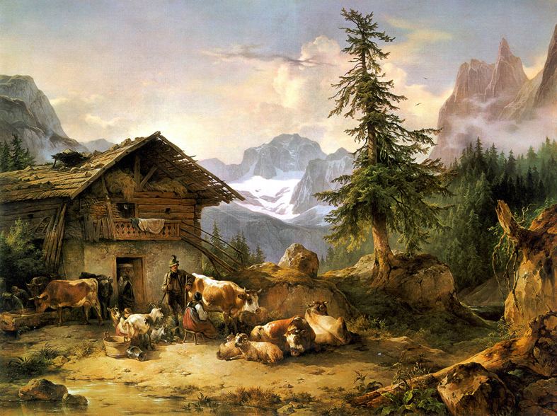 Gemälde der Niederen Holzmeisteralm an der Gosaulacke in Österreich. Gemalt 1846 von Friedrich Gauermann.